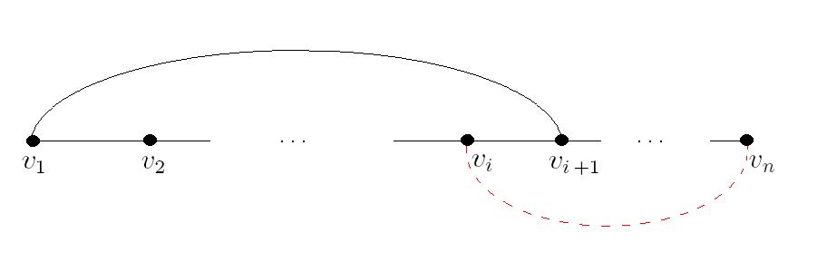 Ábra az Ore-tétel bizonyításához